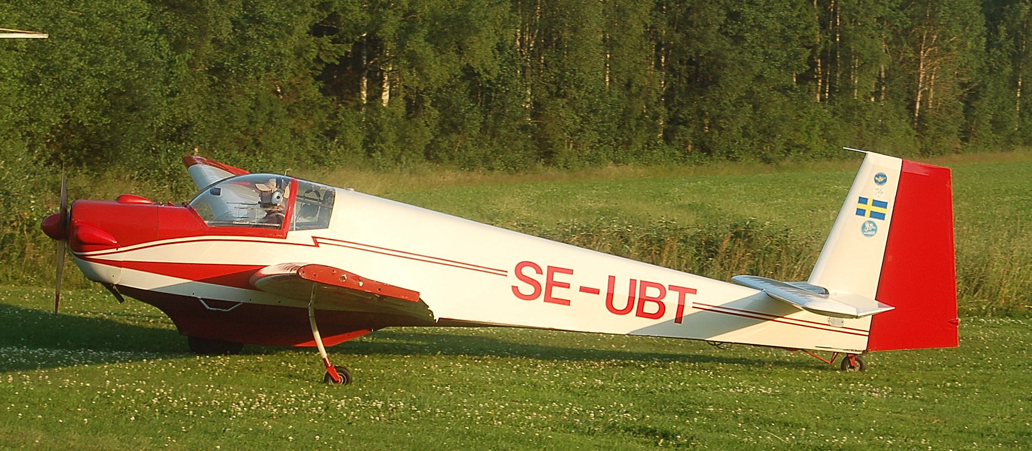 SE-UBT SCHEIBE-SF25C, Tillverkningsnr 4214, Tillverkningsår 1972, Max startvikt (kg) 580